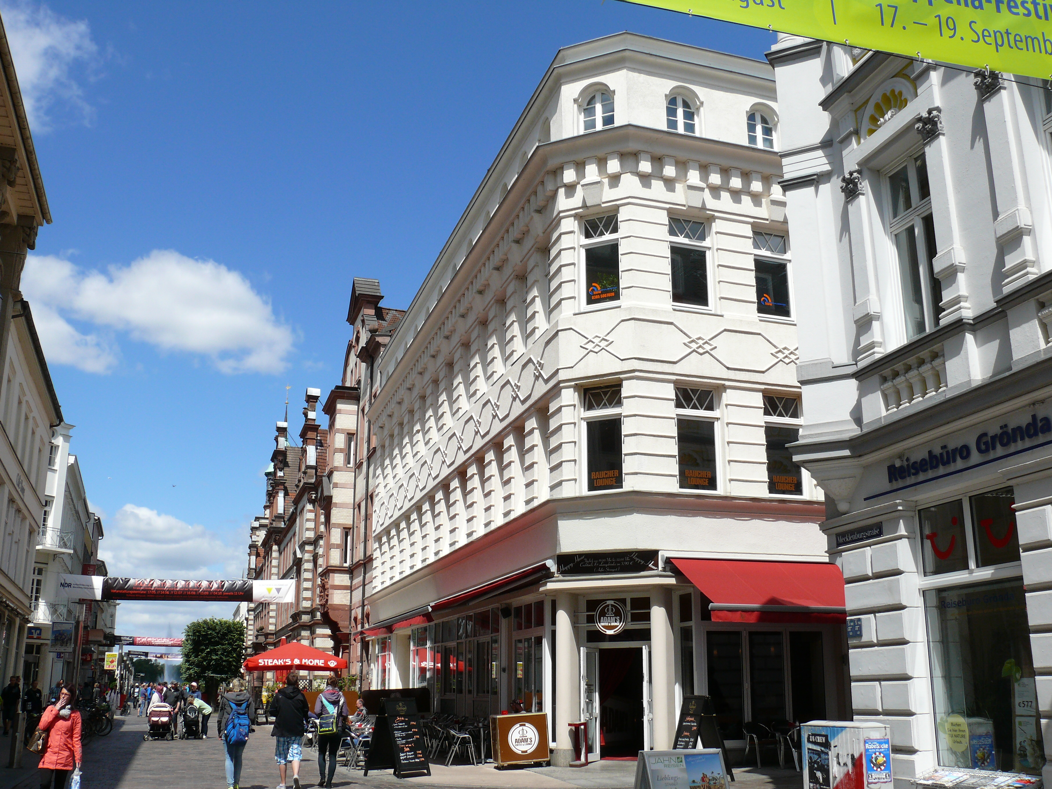 Das Gebäude "Mecklenburgstraße 10-12" in Schwerin.